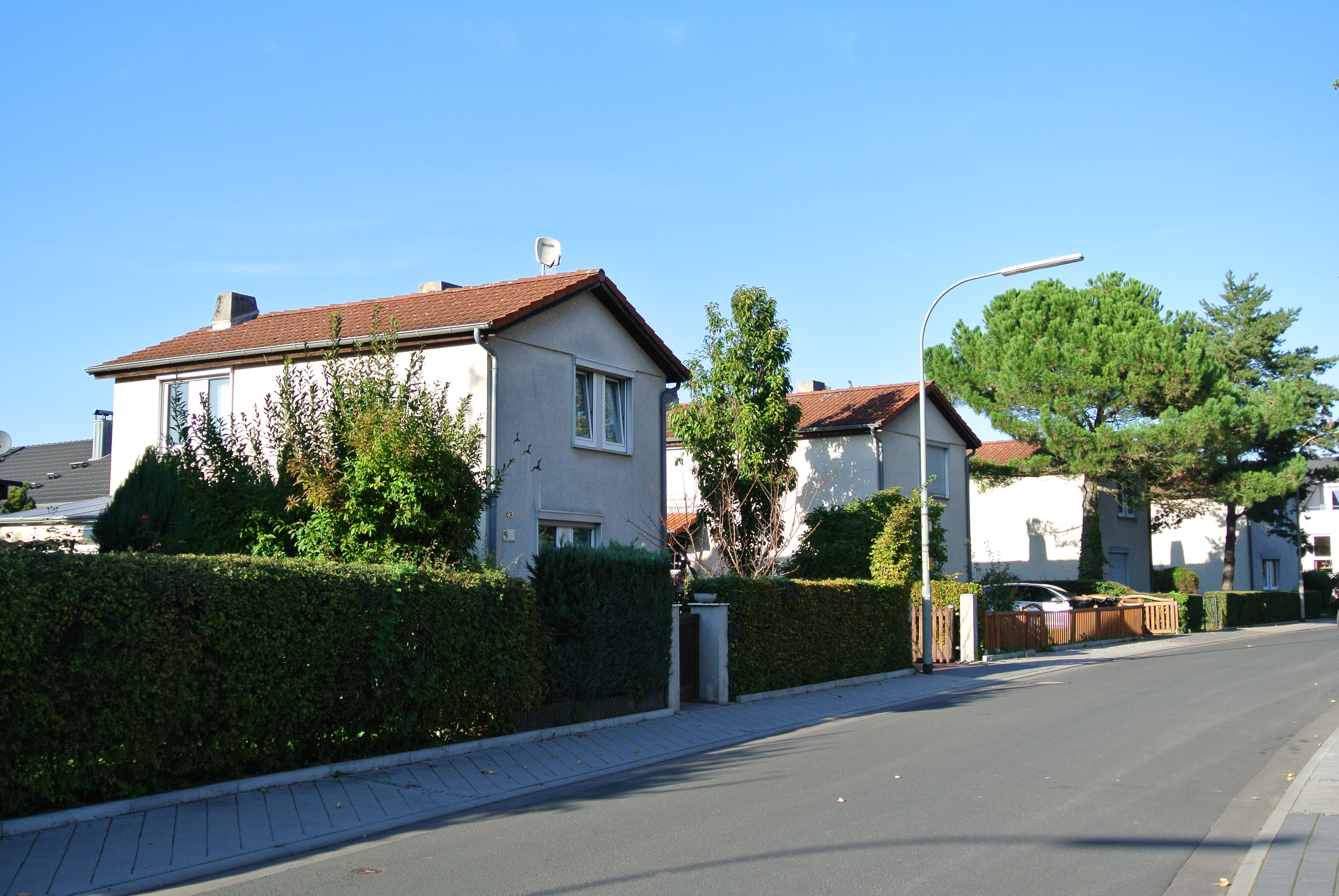 Siedlung Frankfurter Berg, Teilbereich Bizonale Siedlung von 1948 Weißdornweg